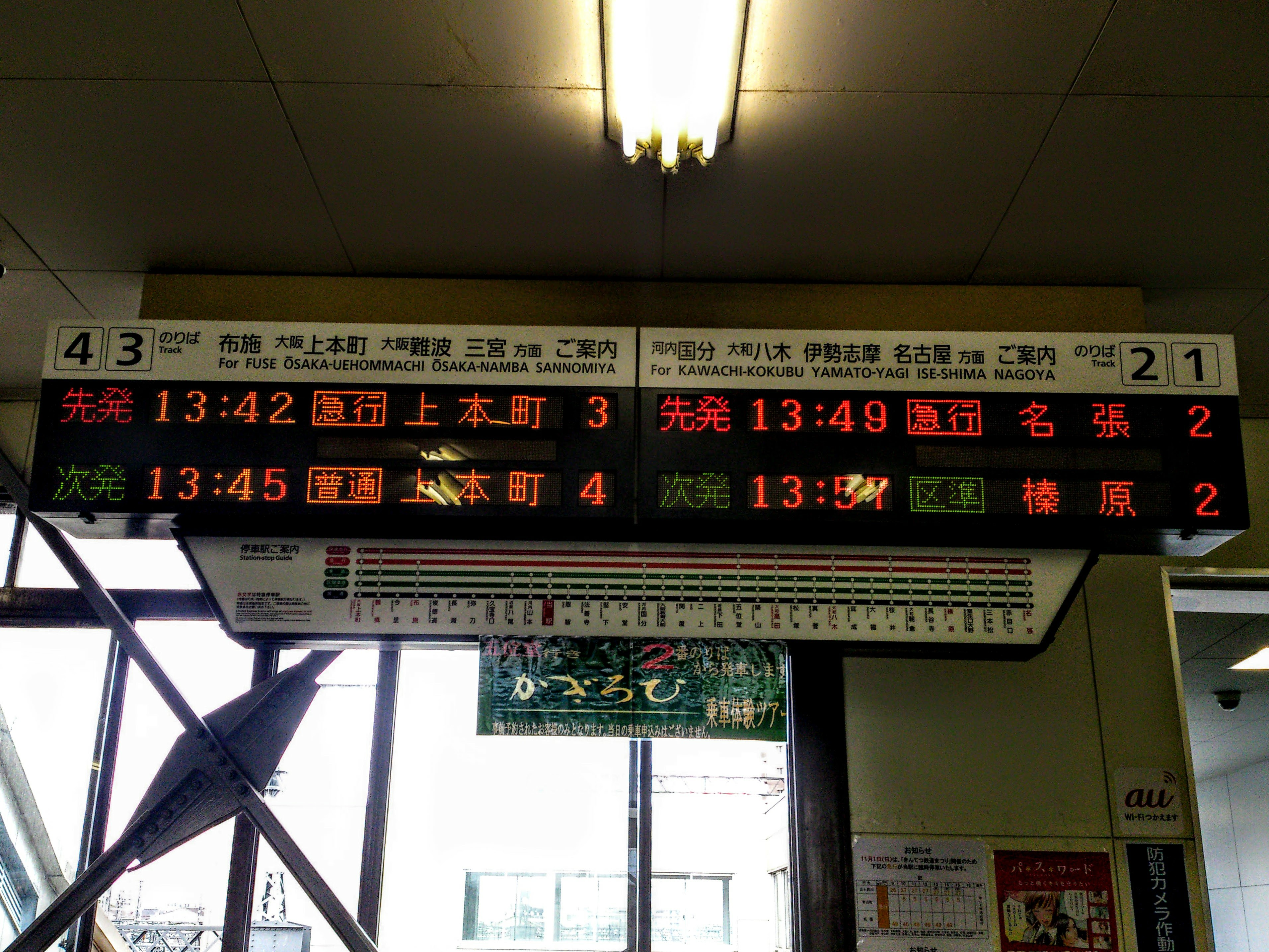 高安駅・発車標